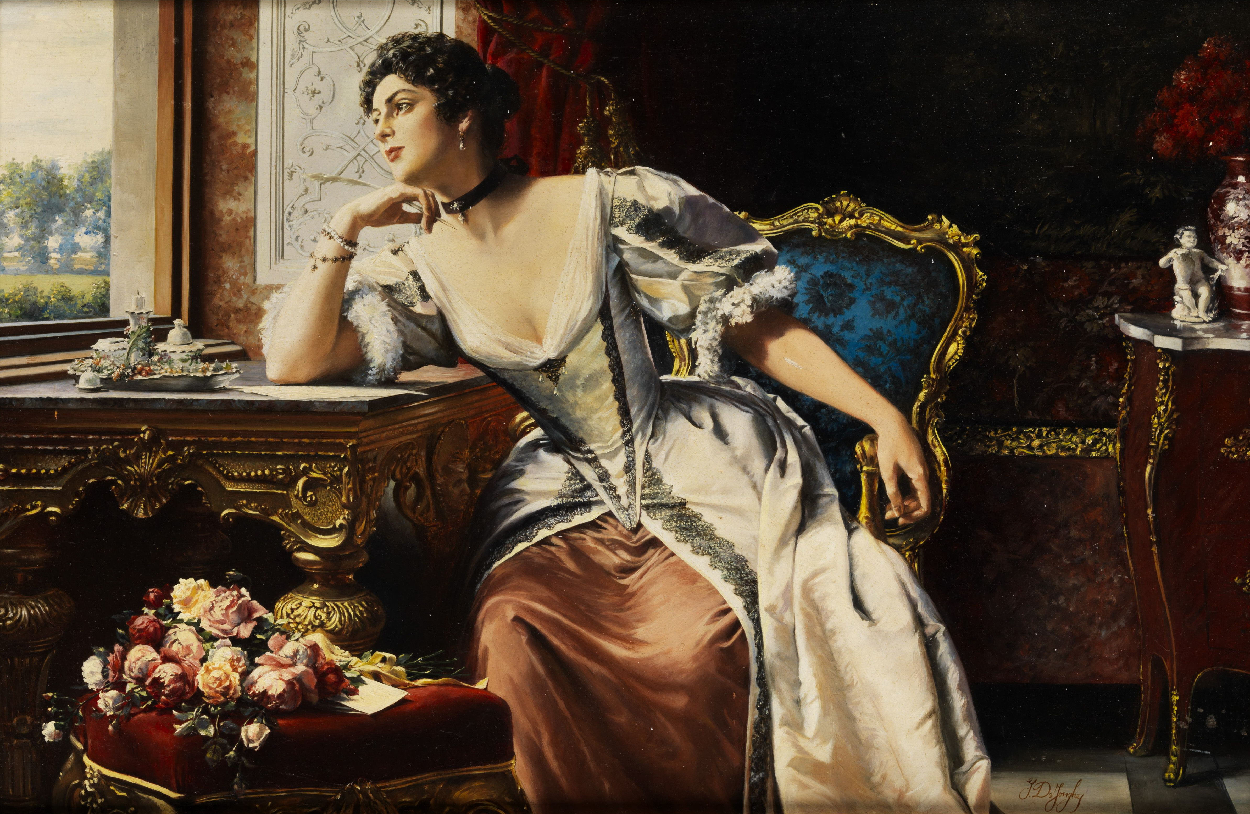 Gedanken beim Verfassen des Briefes. Öl auf Holz. 40,5 x 59,5 cm. Rechts unten signiert.